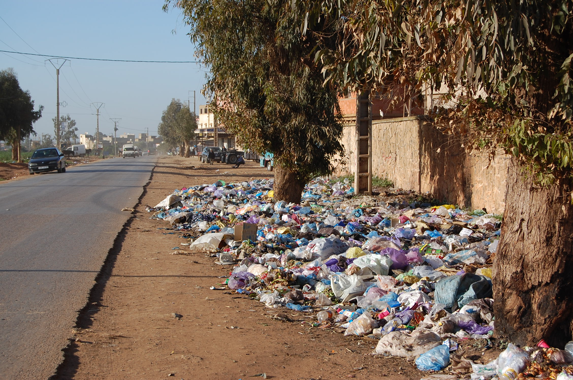 Walon: Tapaedje-evoye di plastike a l' intrêye do viyaedje d'Ayin Tekki, (province di Mohammedia, Marok)